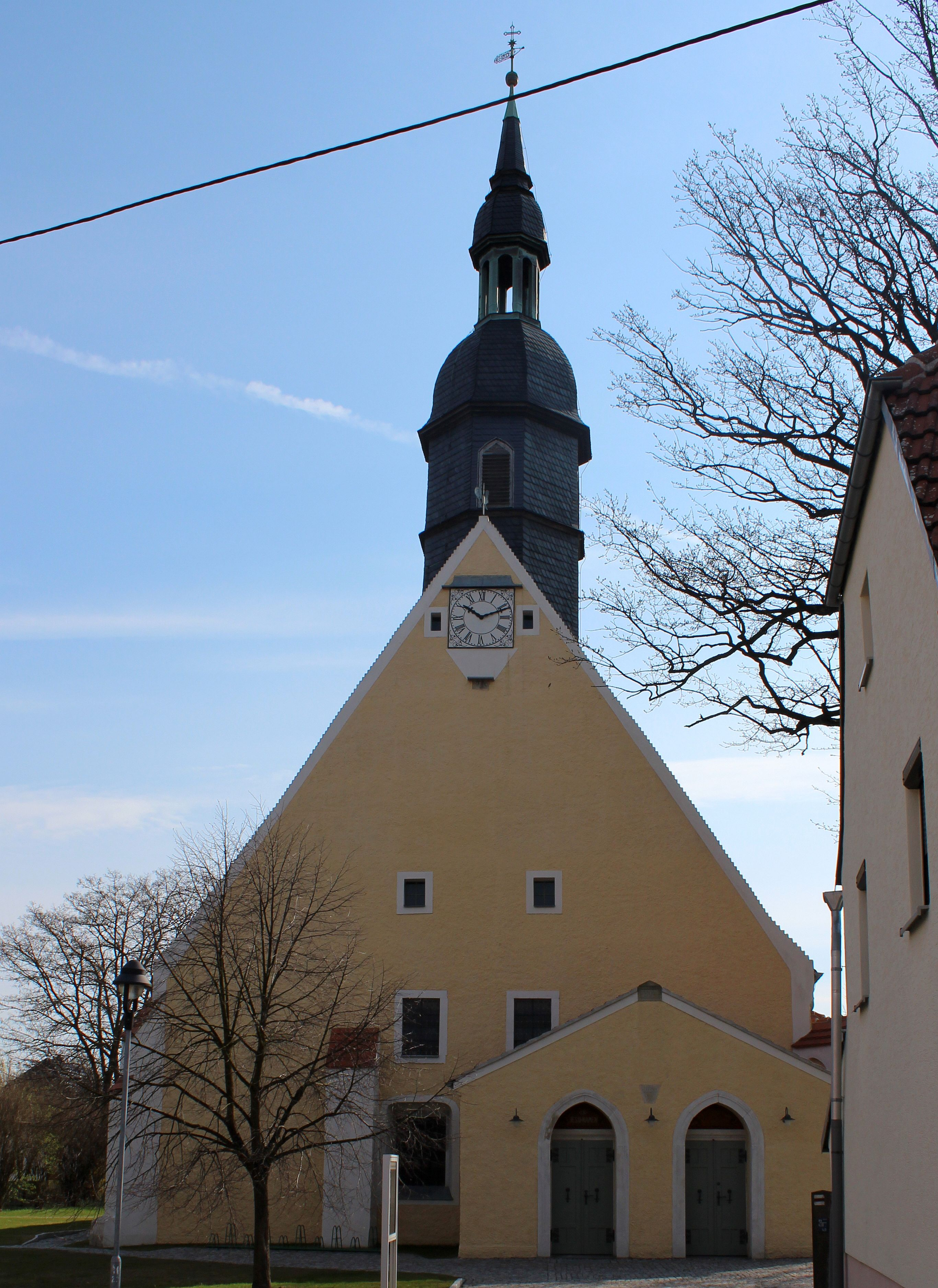 Dorfkirche in Frauenhain (Röderaue)